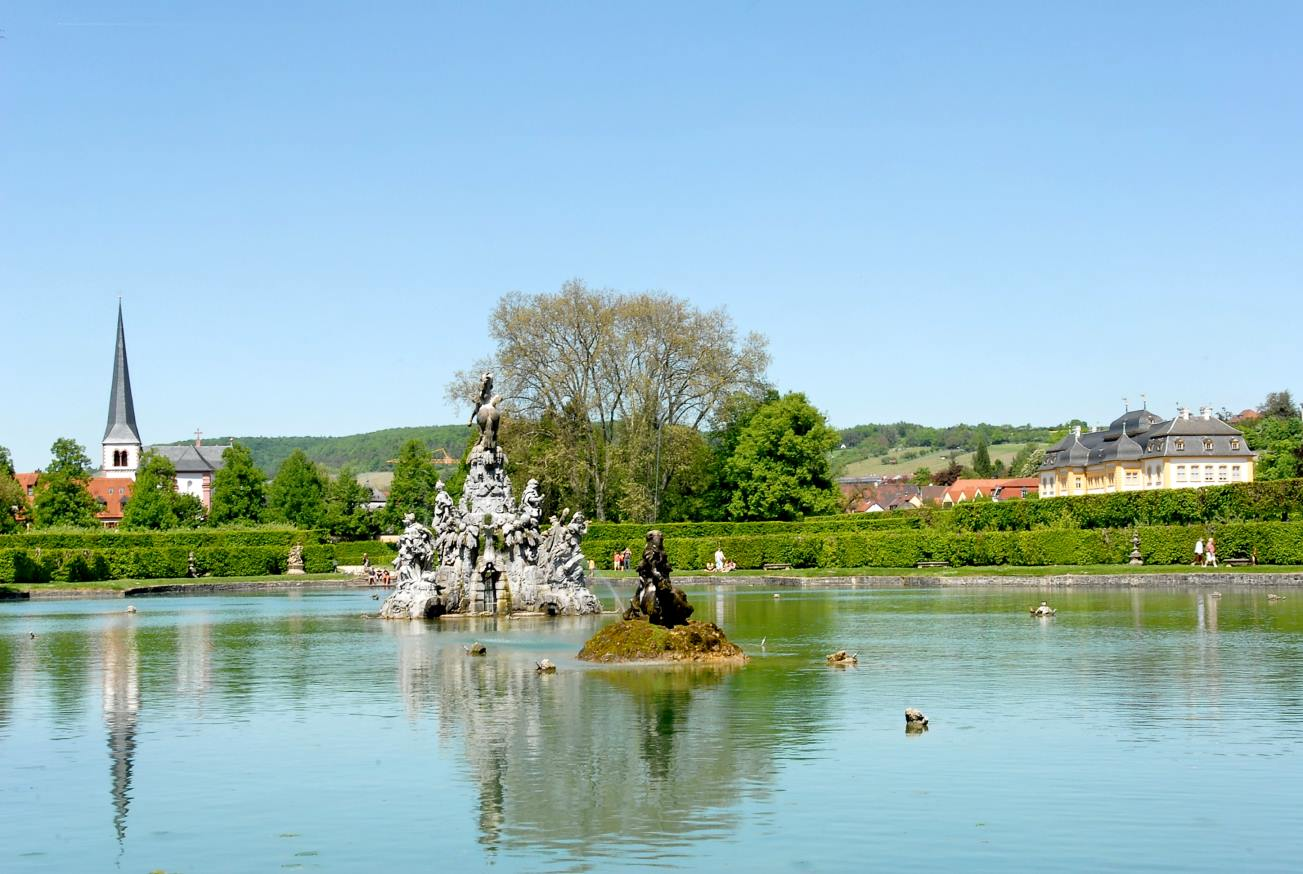 Veitshöchheim, Ansicht/ Viiew from rokokogarten